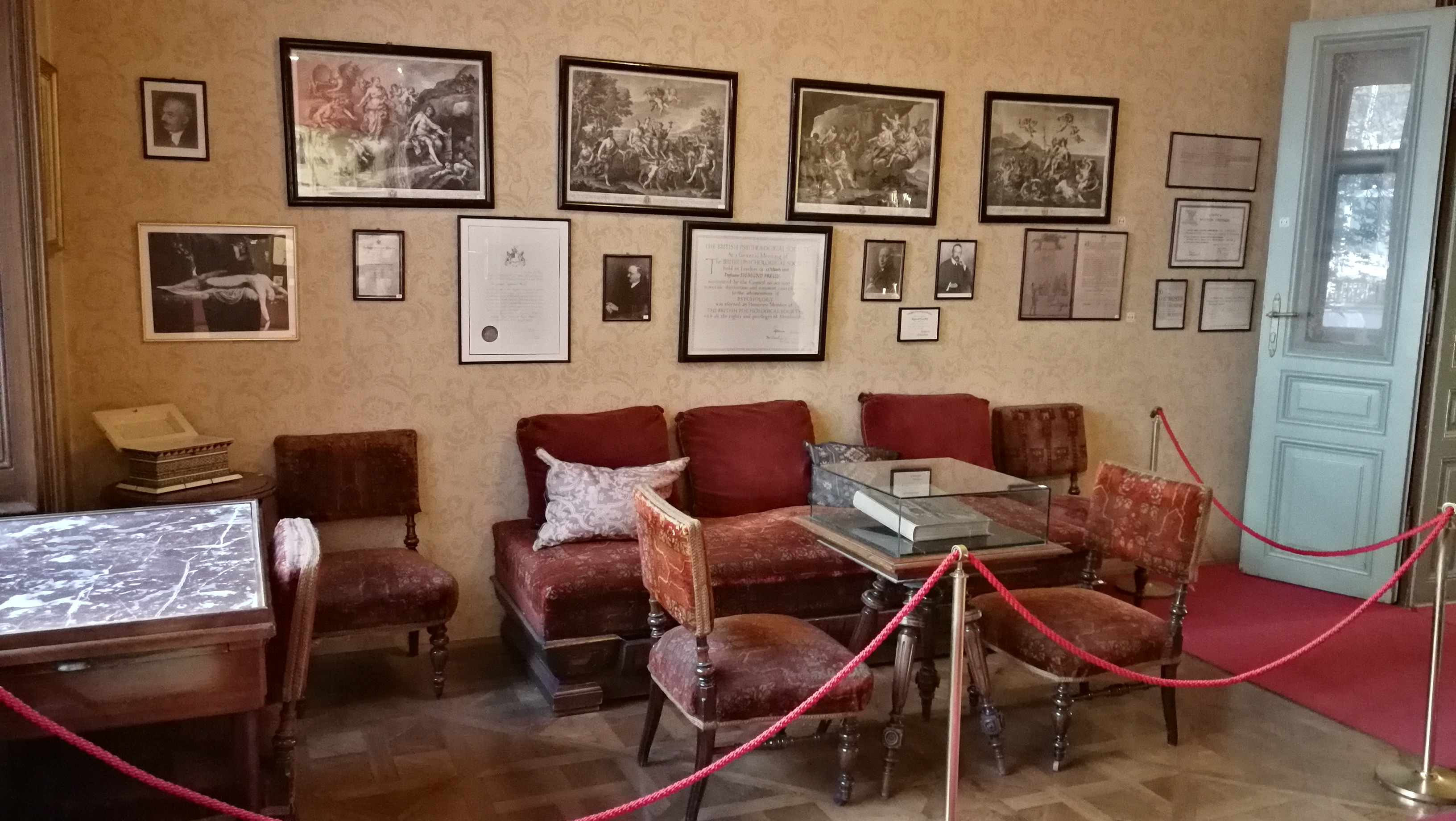 Das Wartezimmer von Sigmund Freud im 1. Obergeschoss der Berggasse 19, 1090 Wien (Österreich) - einer der wenigen Räume im heutigen Sigmund-Freud-Museum, der praktisch in Originalausstattung gezeigt wird.